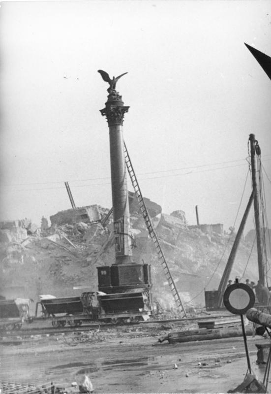 ADN-ZB/Donath Berlin: Abriß der Ruine des Berliner Schlosses Aufn. 1950